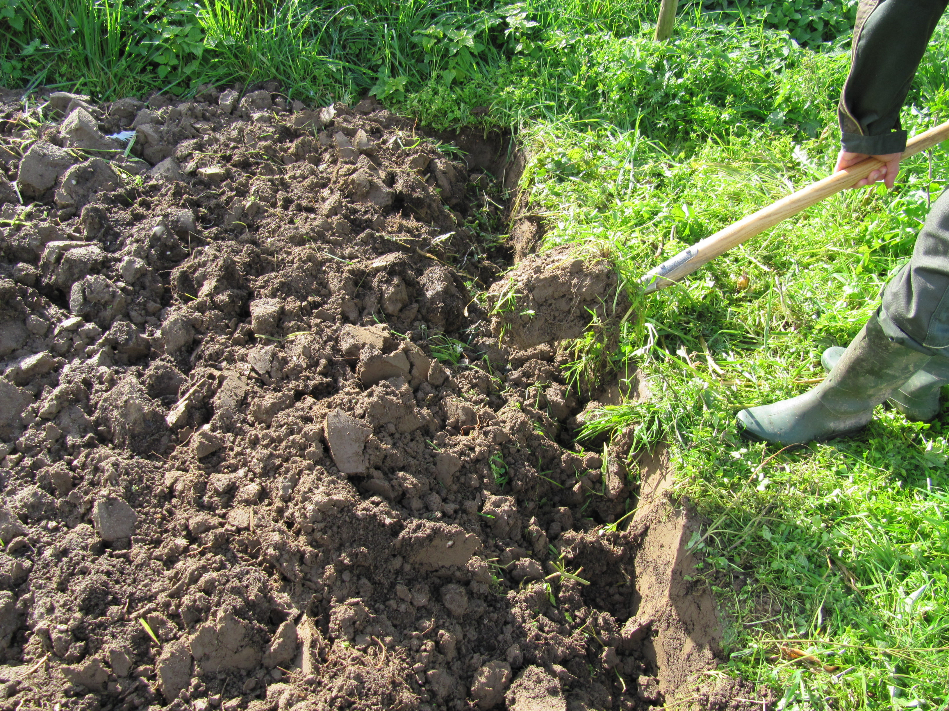 Grabearbeit mit dem Spaten, Bild 4: Sodann wird die abgestochene Erdscholle hochgehoben und durch seitliches Kippen des Spatens am gegenüberliegenden Furchenrand an den bereits gegrabenen Boden abgelegt.